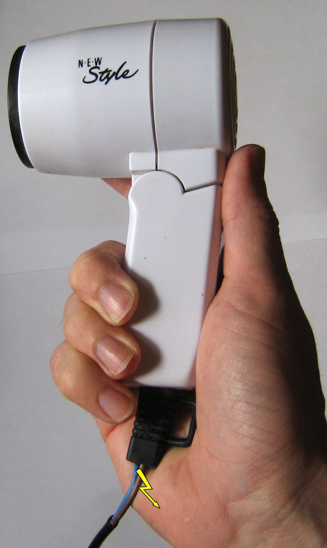 Stromunfall, defektes Netzkabel am Reisefön